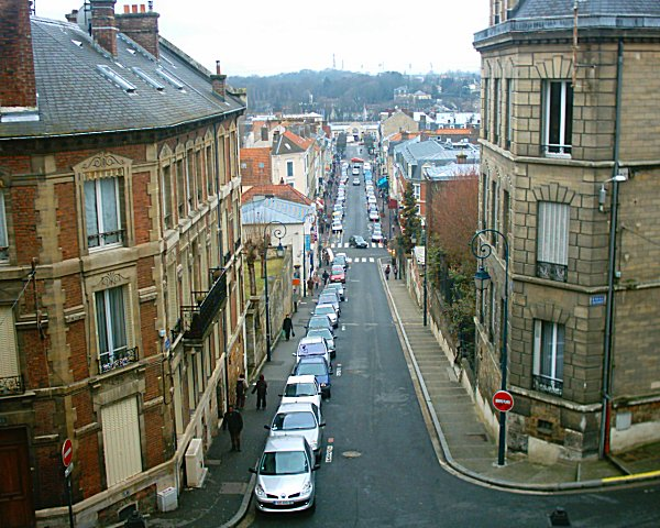 Rue Thiers, Pontoise on 03/03/06.